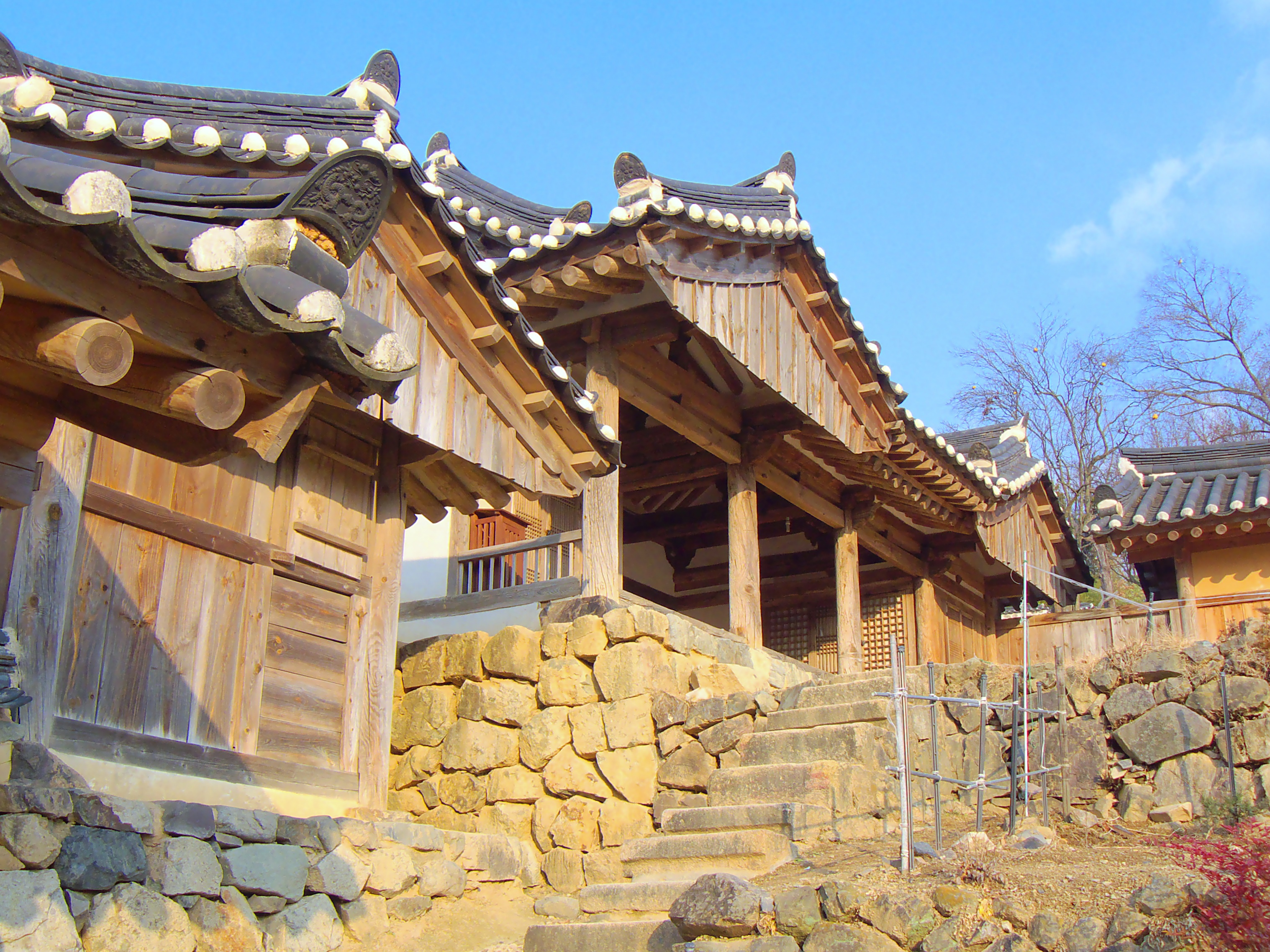 Gyeongju-Yangdong Village